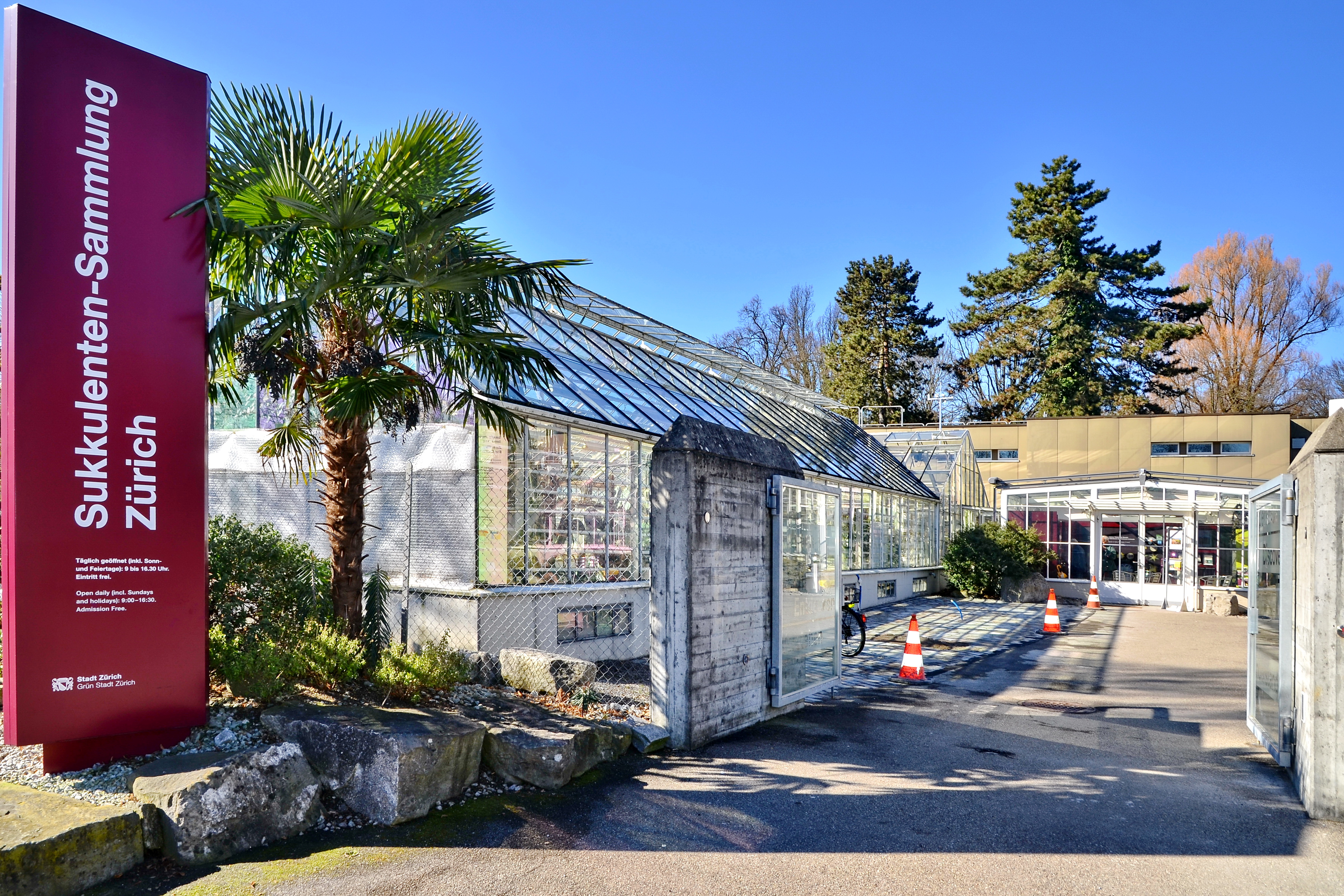 Sukkulenten-Sammlung Zürich, Mythenquai in Zürich